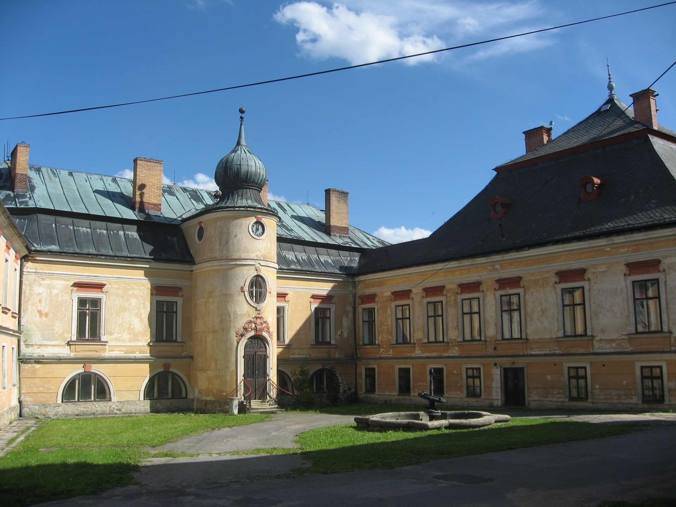 Větrný Jeníkov, zámek